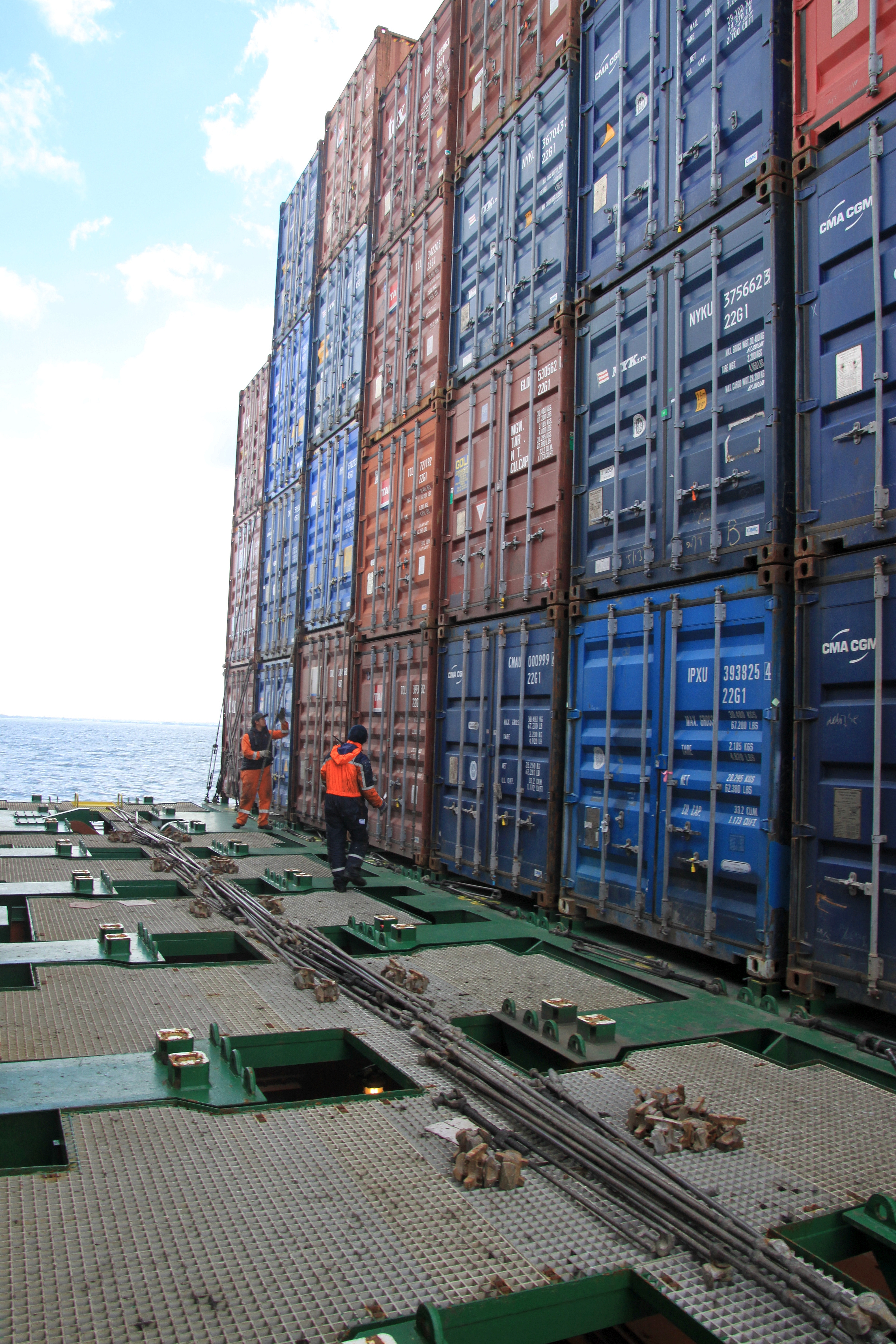 KATHARINA SCHEPERS - Container an Deck